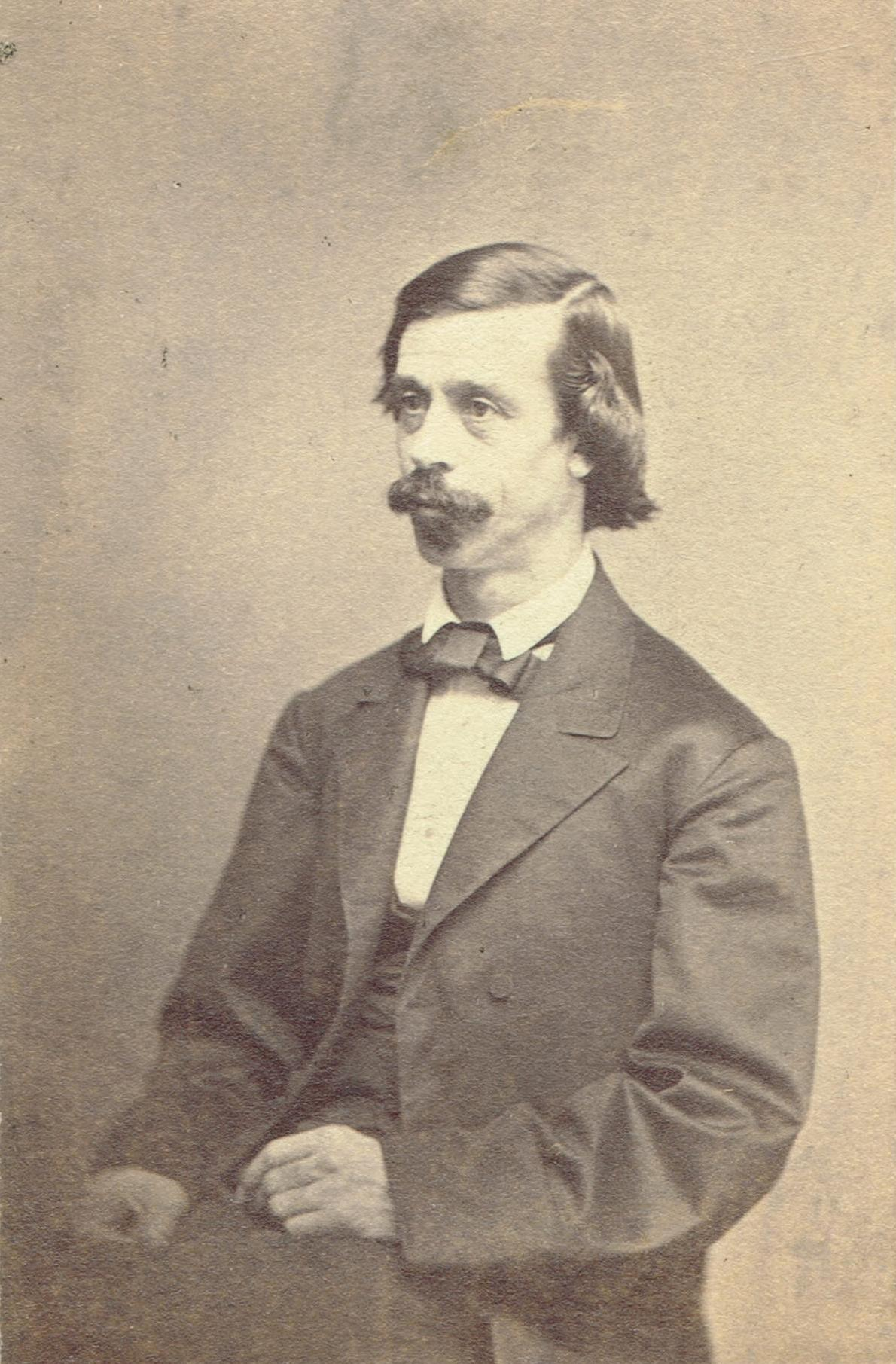 James Hammond Trumbull (1821–1897), US-amerikanischer Historiker und Sprachwissenschaftler, Staatssekretär von Connecticut 1861–1866. Visitenkartenporträt